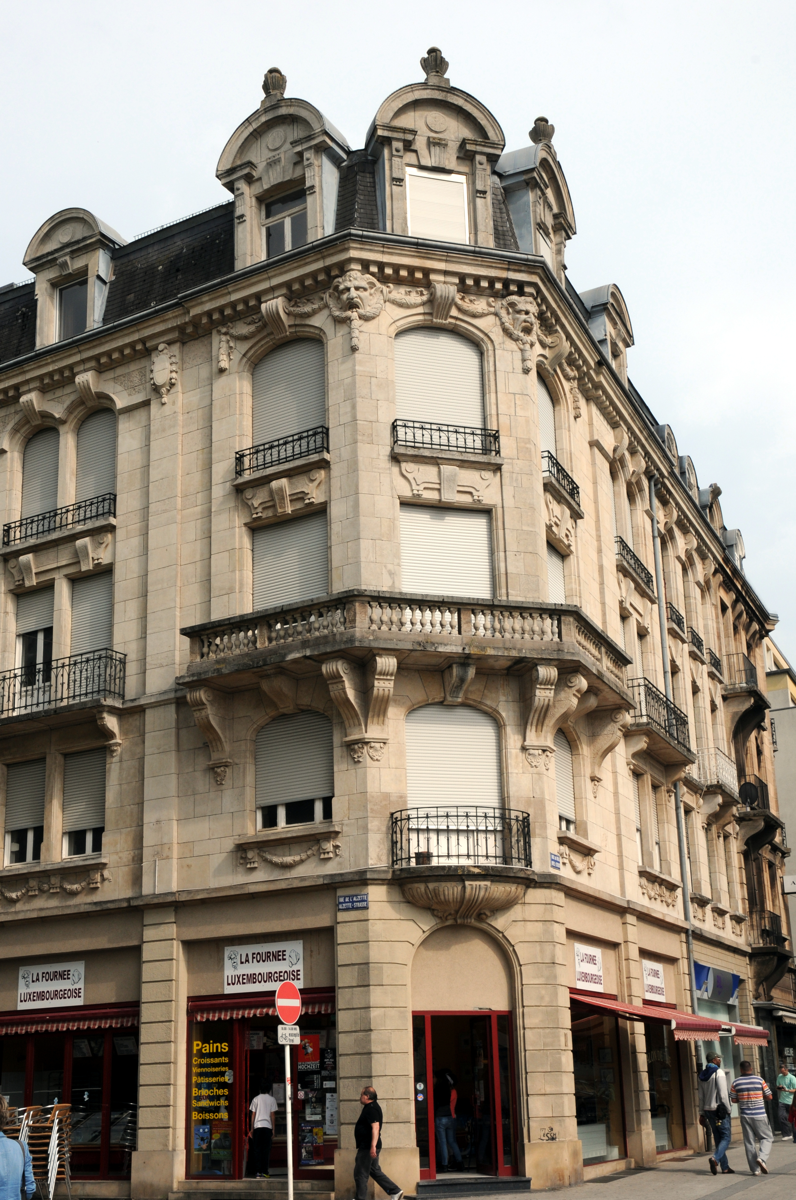 D'Gebäi op Nr 135 an der Uelzechtstrooss zu Esch.